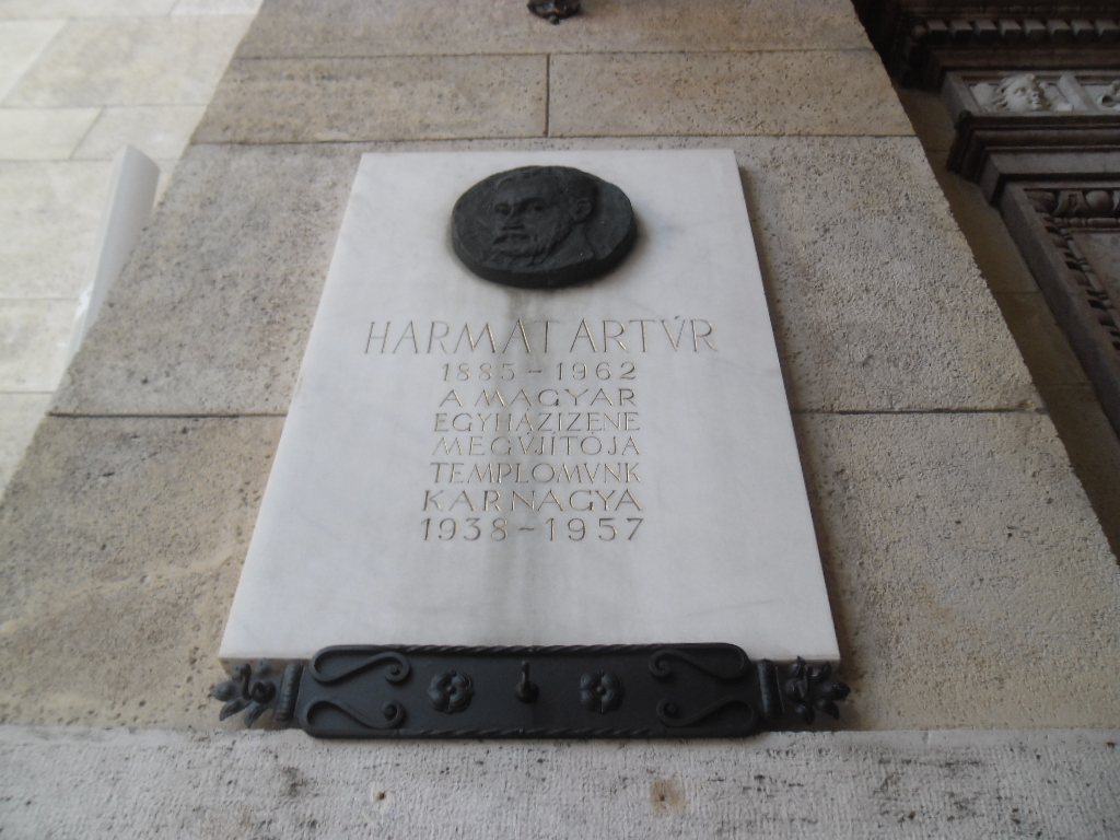 Budimpešta, MađarskaHarmat Artúr-emléktábla (Borsos Miklós, 1967). - Magyarország, Budapest, V. kerület, Szt István tér a Bazilika előcsarnokának falán